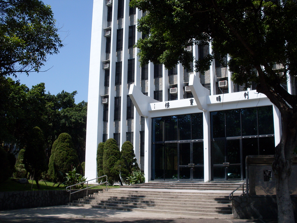 輔大社科院、管理學院（利瑪竇樓）